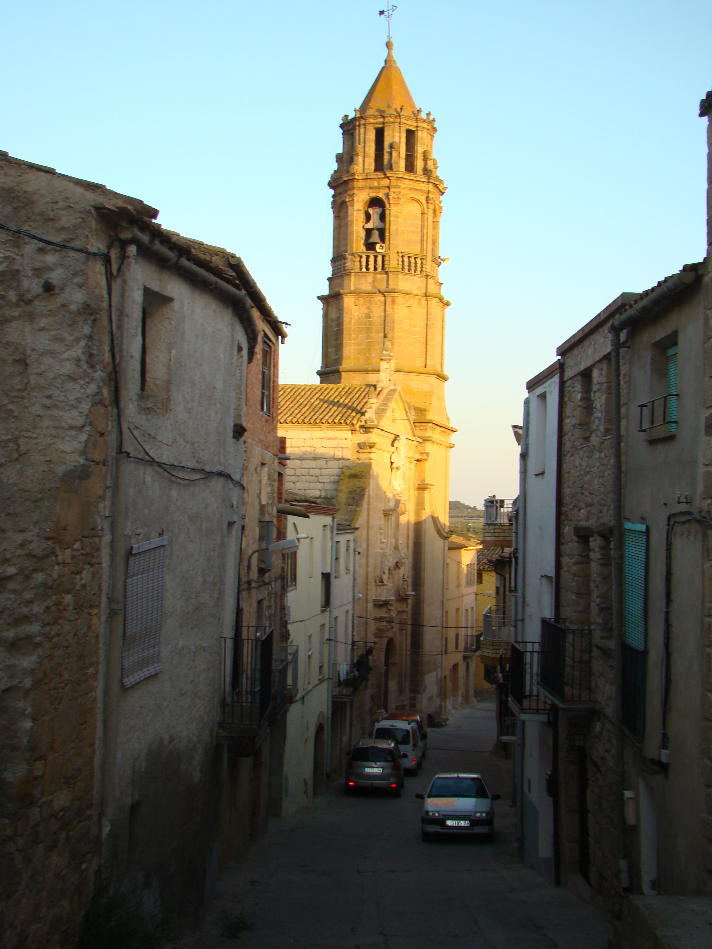 Murs de l'antic Clos murat i Castell de Llardecans